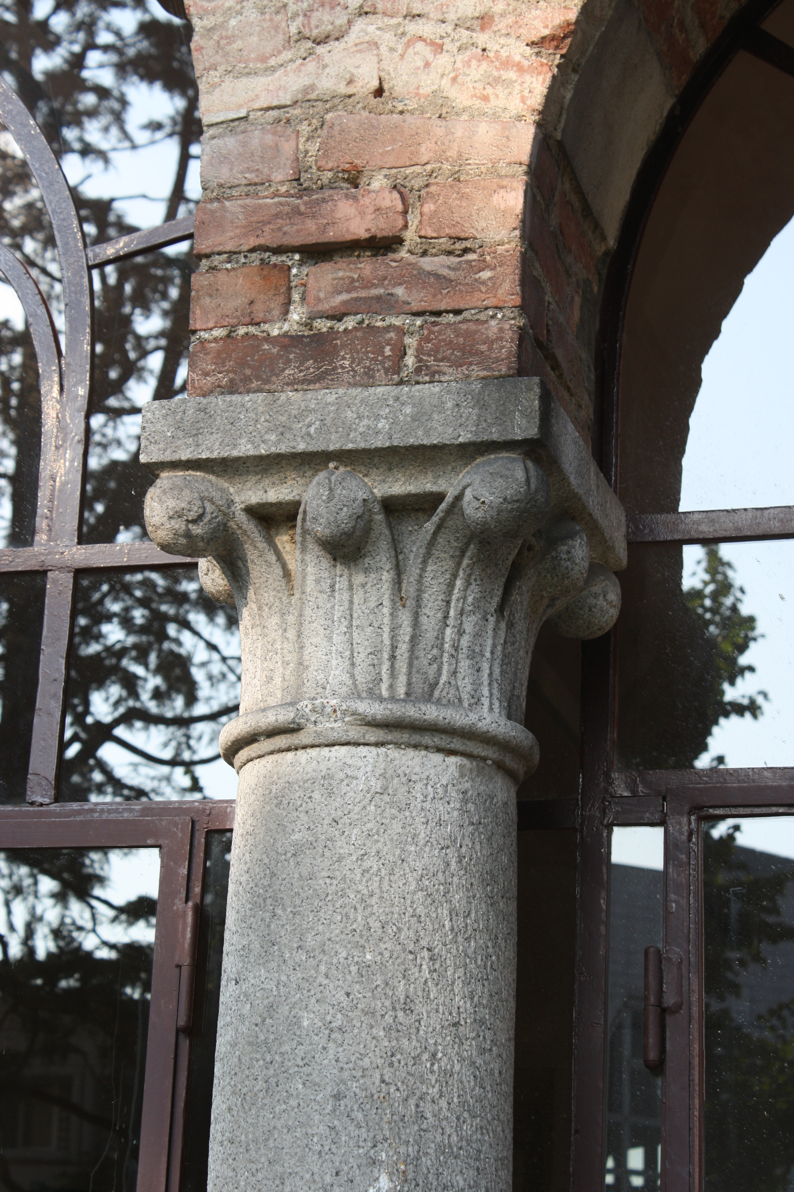 Palazzo Leone da Perego a Legnano: il capitello di una delle colonne dell'ingresso principale This is a photo of a monument which is part of cultural heritage of Italy.